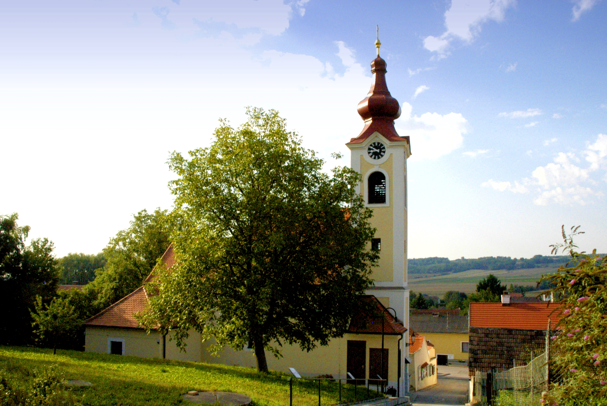 Pfarrkirche zur hl. Anna in Oberfellabrunn, Gemeinde Hollabrunn